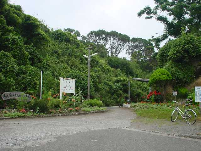 御領駅（2005年7月投稿者が撮影）